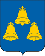 Герб города Далматово (Курганская область) (2006 г.)